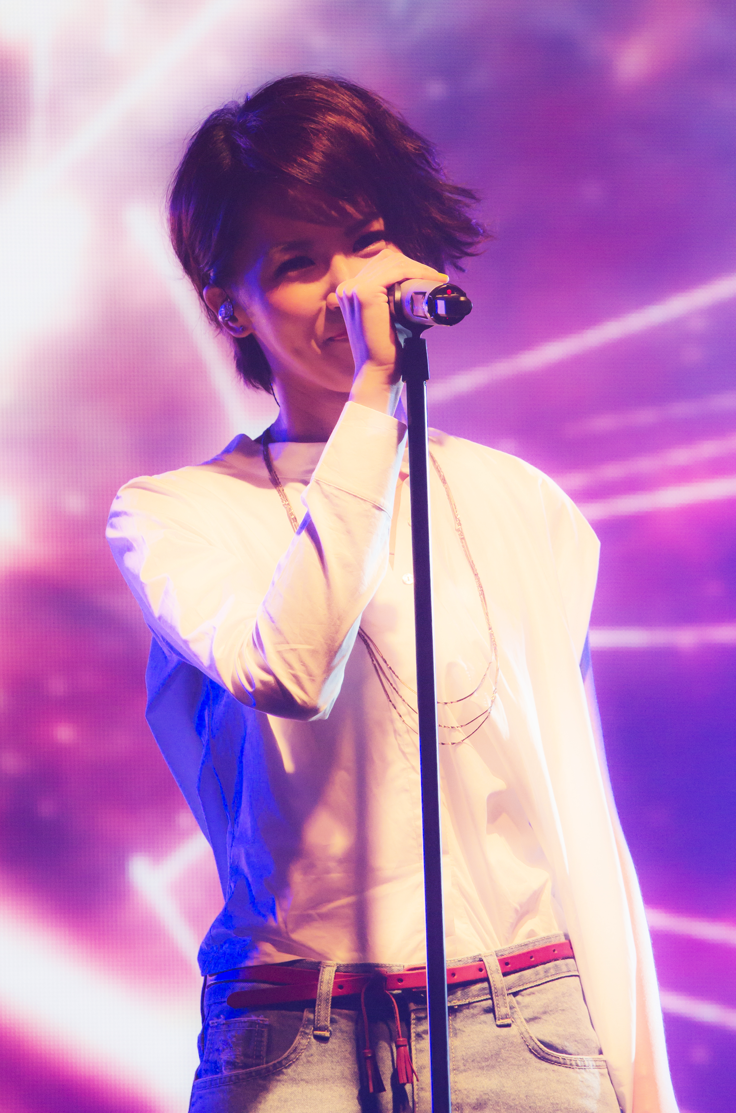 曾沛慈是台灣女歌手。照片於20140822《犀利啥小趴》曾沛慈演唱會拍攝（演唱會地點：松山文創園區一號倉庫），第一次發佈有LOGO版是在微博。